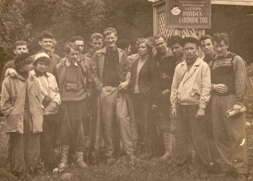 Кавказ,_12_липня_1958_року.: Сер Джон Хант на Кавказі в Приельбруссі (липень 1958 року).